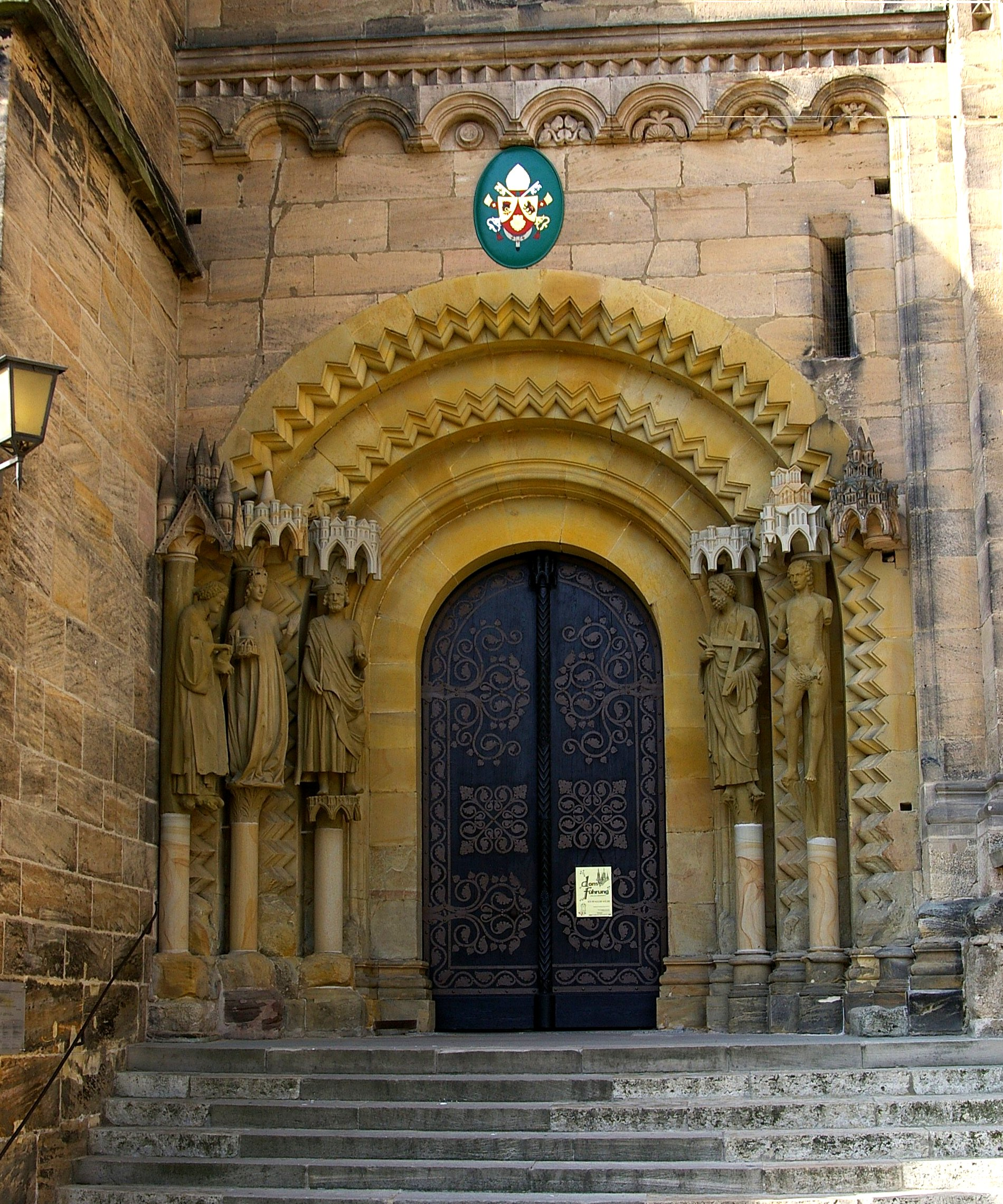 Bamberger Dom - Adamspforte